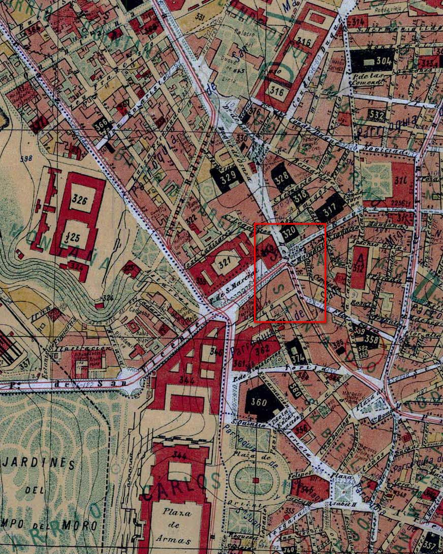 Situación de la calle Leganitos en el plano de Madrid de Facundo Cañadas, publicado en 1902